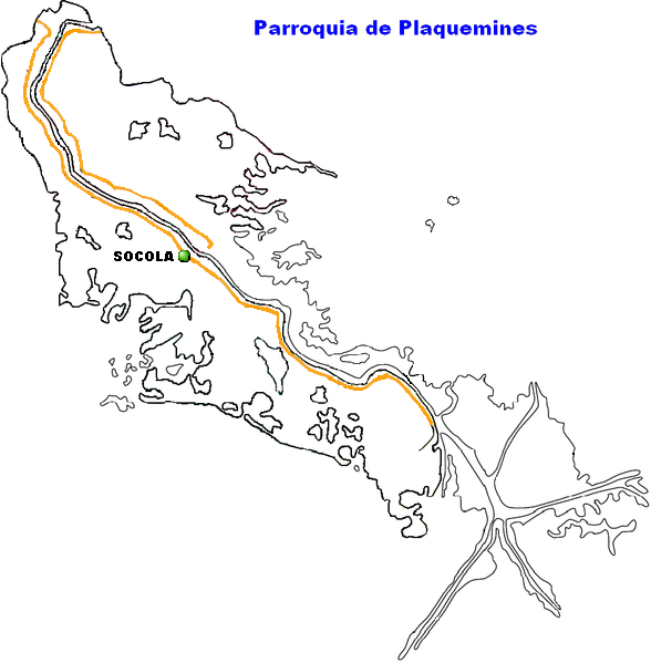 Socola, Louisiana